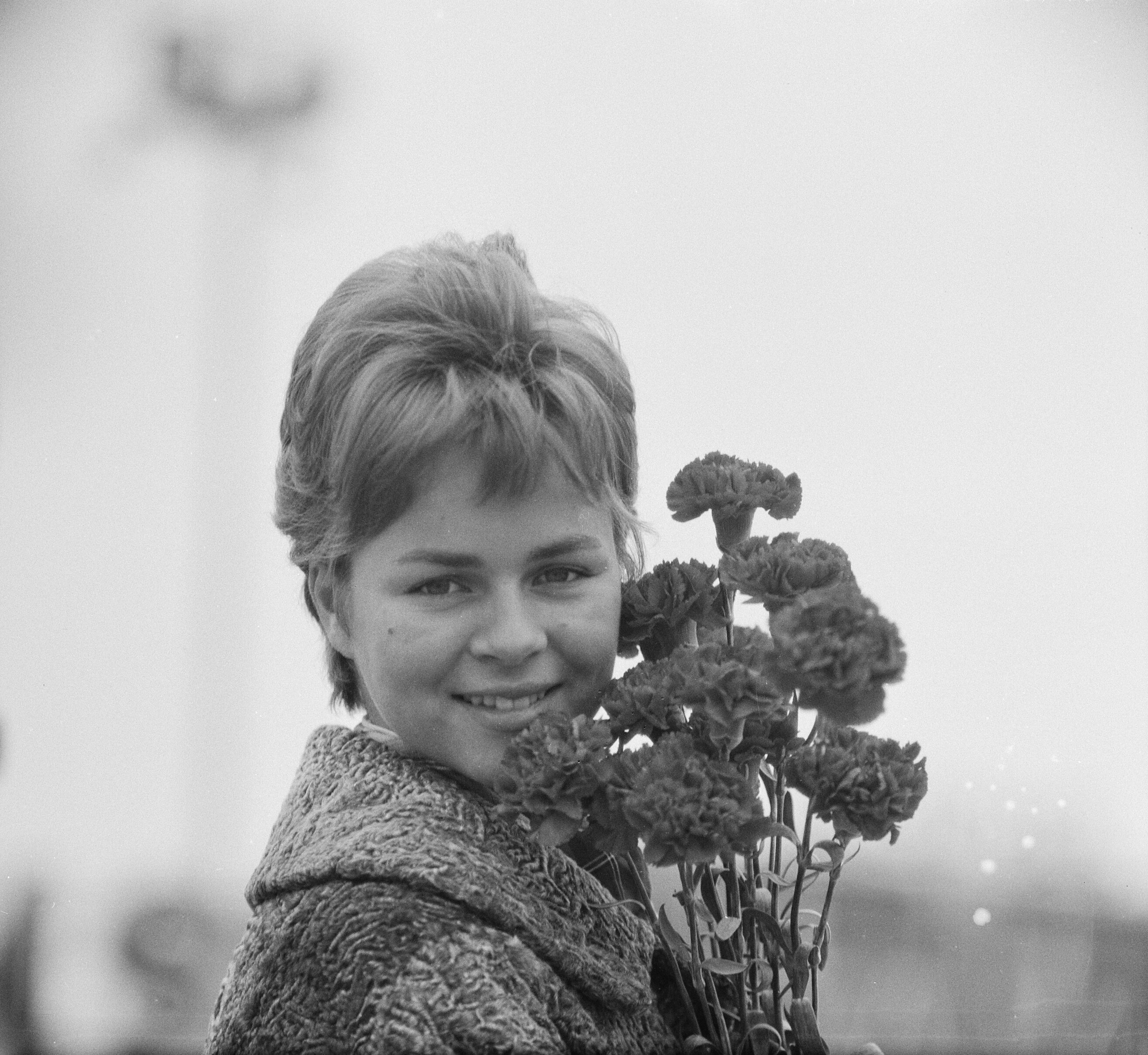 Collectie / Archief : Fotocollectie Anefo Reportage / Serie : [ onbekend ] Beschrijving : Conny Froboes uit Hamburg op Schiphol aangekomen voor de Grand Gala de Disque Datum : 27 september 1962 Locatie : Noord-Holland, Schiphol Trefwoorden : aankomsten Persoonsnaam : Conny Froboes, Grand Gala de Disque Fotograaf : Gelderen, Hugo van / Anefo Auteursrechthebbende : Nationaal Archief Materiaalsoort : Negatief (zwart/wit) Nummer archiefinventaris : bekijk toegang 2.24.01.03 Bestanddeelnummer : 914-3486